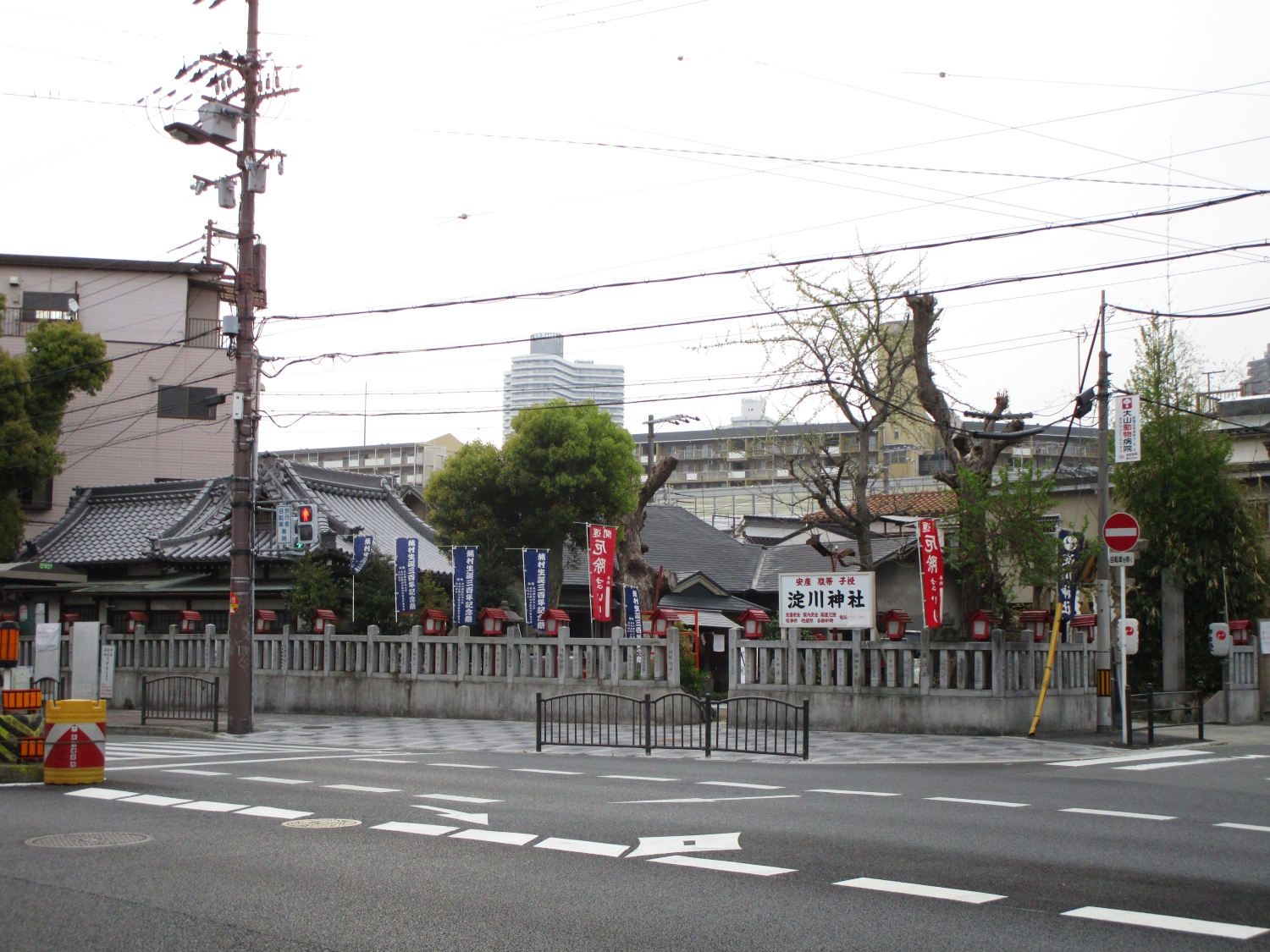 淀川神社（大阪市都島区）